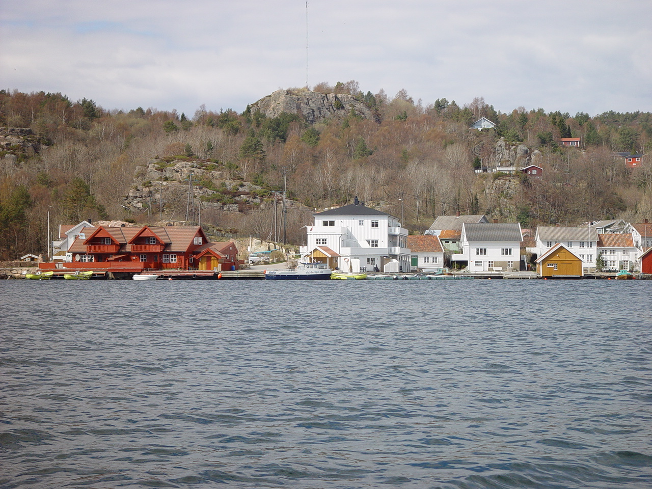 Åvik havn